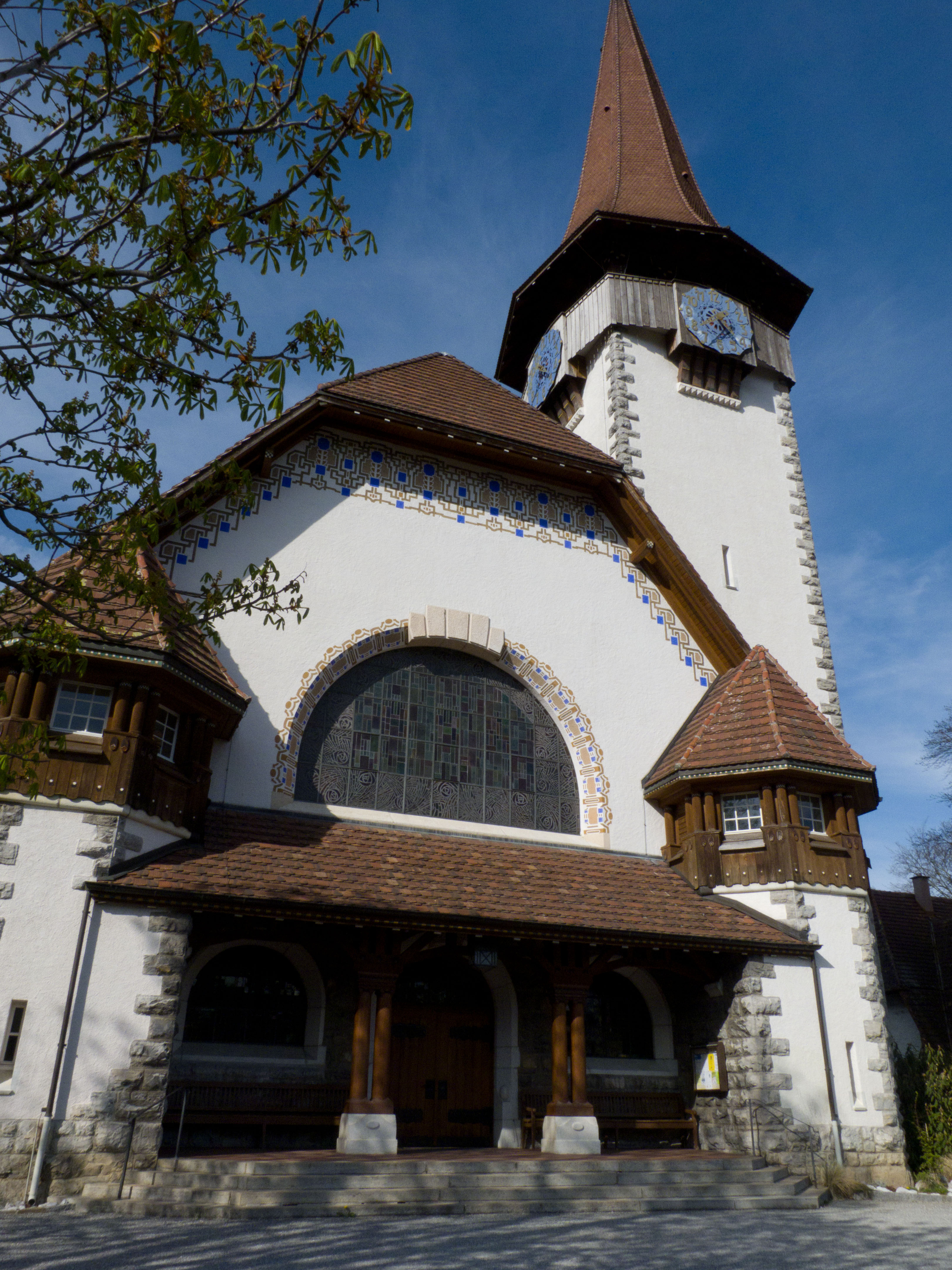 Neue protestantische Kirche